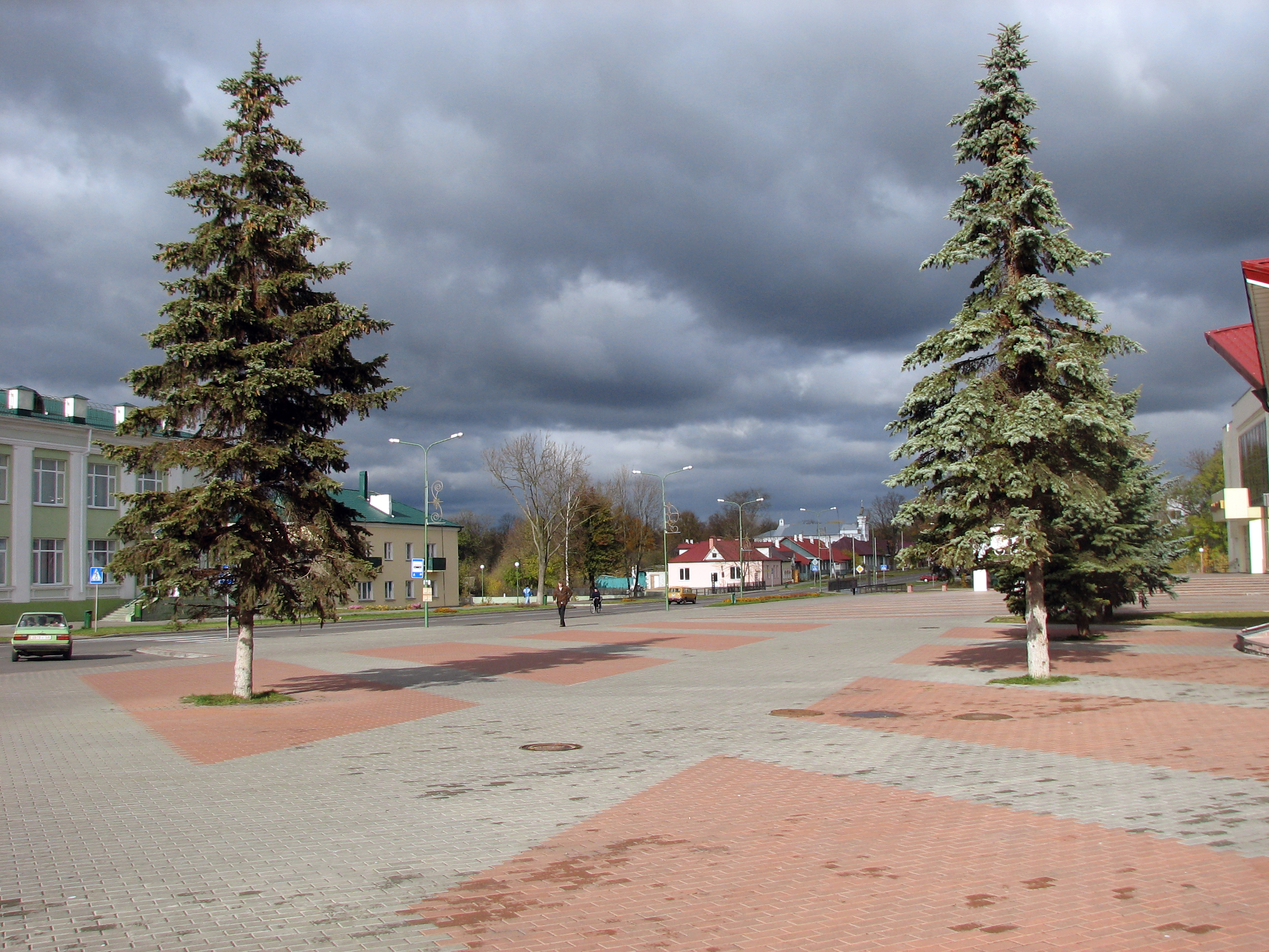 Беларуская (тарашкевіца): Вуліца Савецкая і плошча ля Дома культуры, Пружаны. 2005